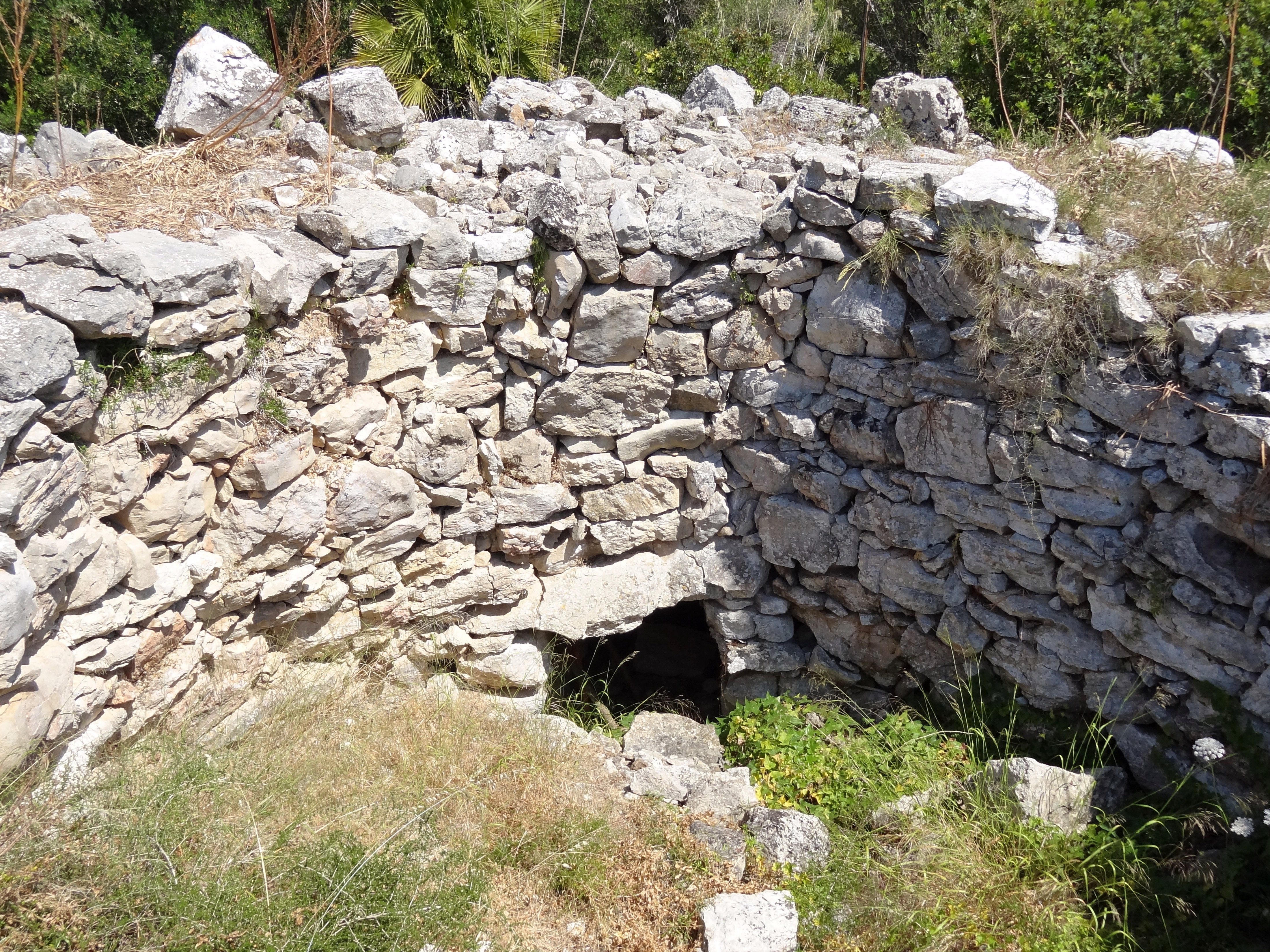 Prähistorischen Siedlung es Claper des Gegants bei Canyamel, Gemeinde Capdepera, Mallorca, Spanien